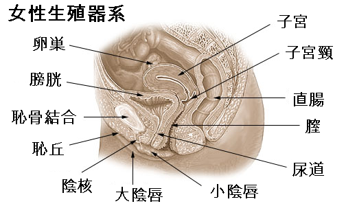 女性生殖器系 (PNG)